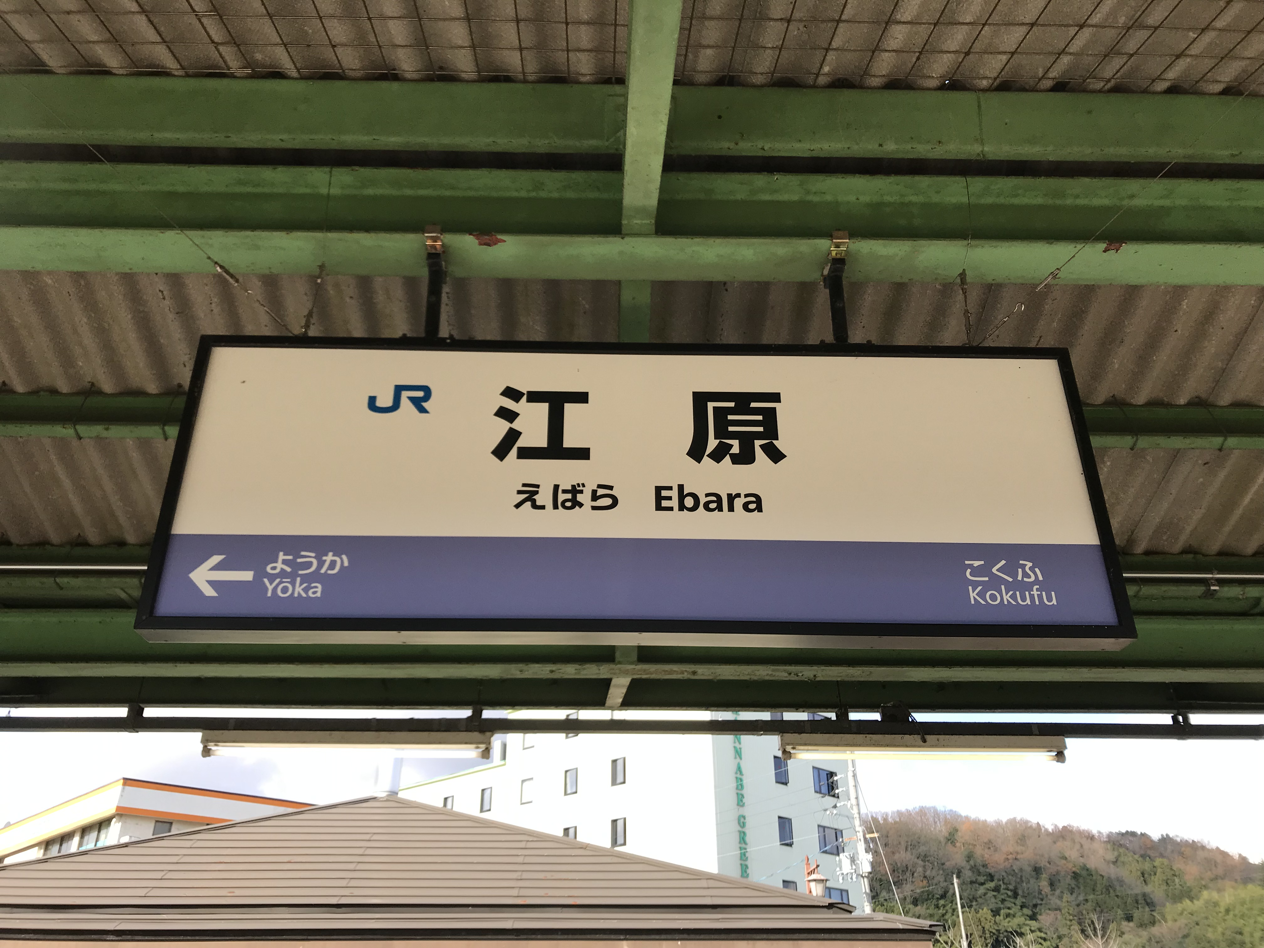 山陰線江原駅 駅名標